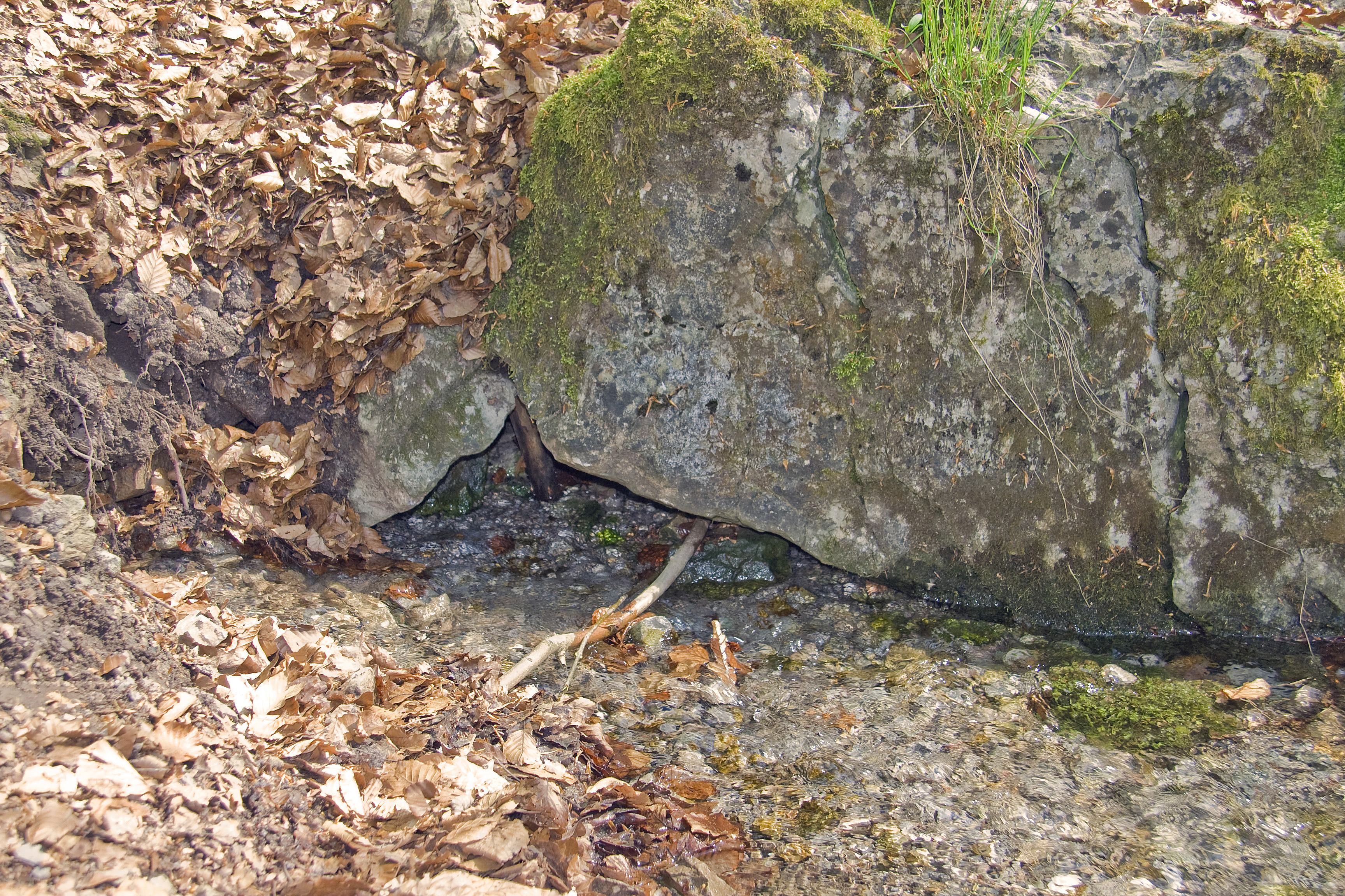 Quelle Nummer 1 der Alme